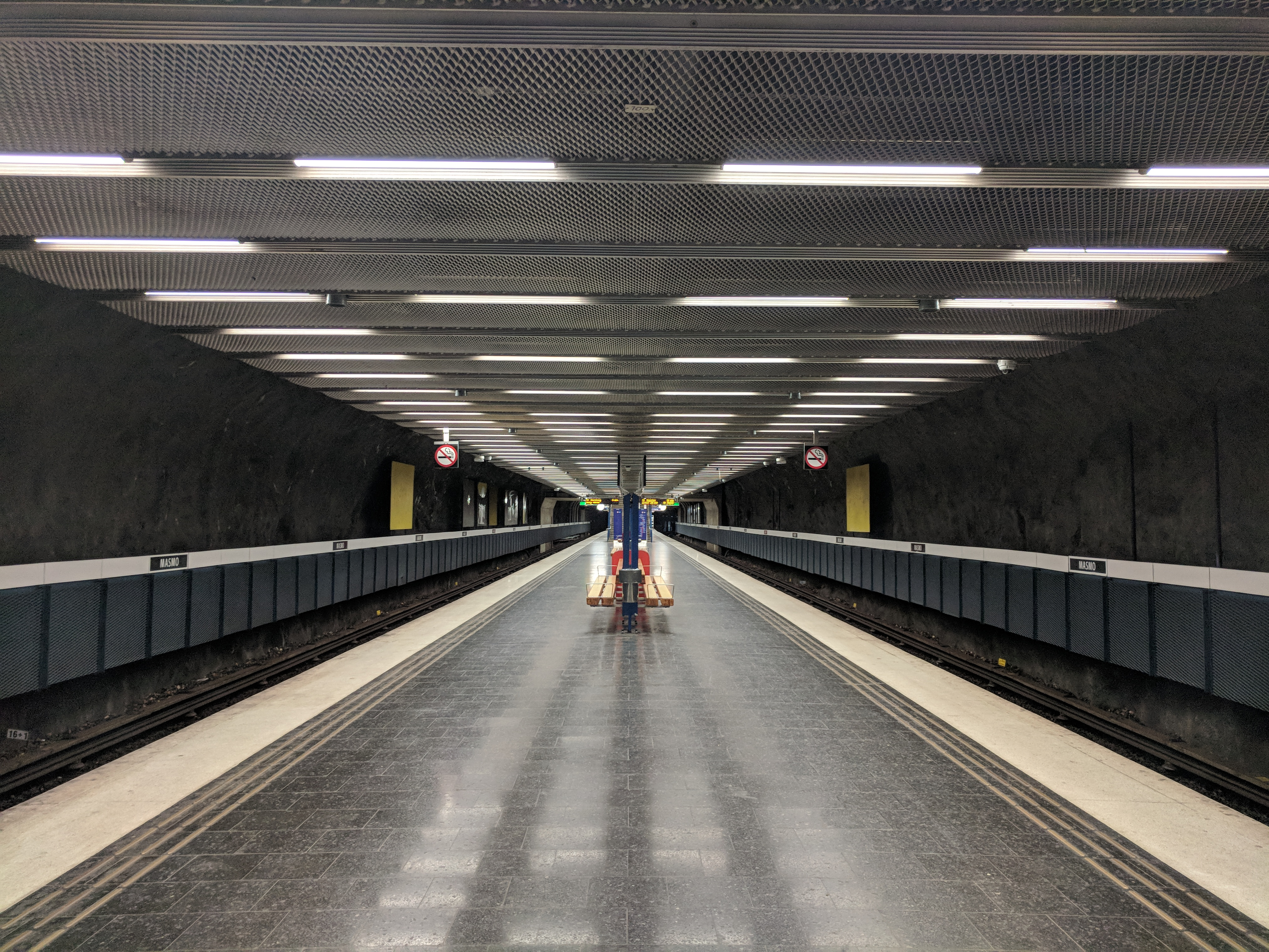 Masmo tunnelbana